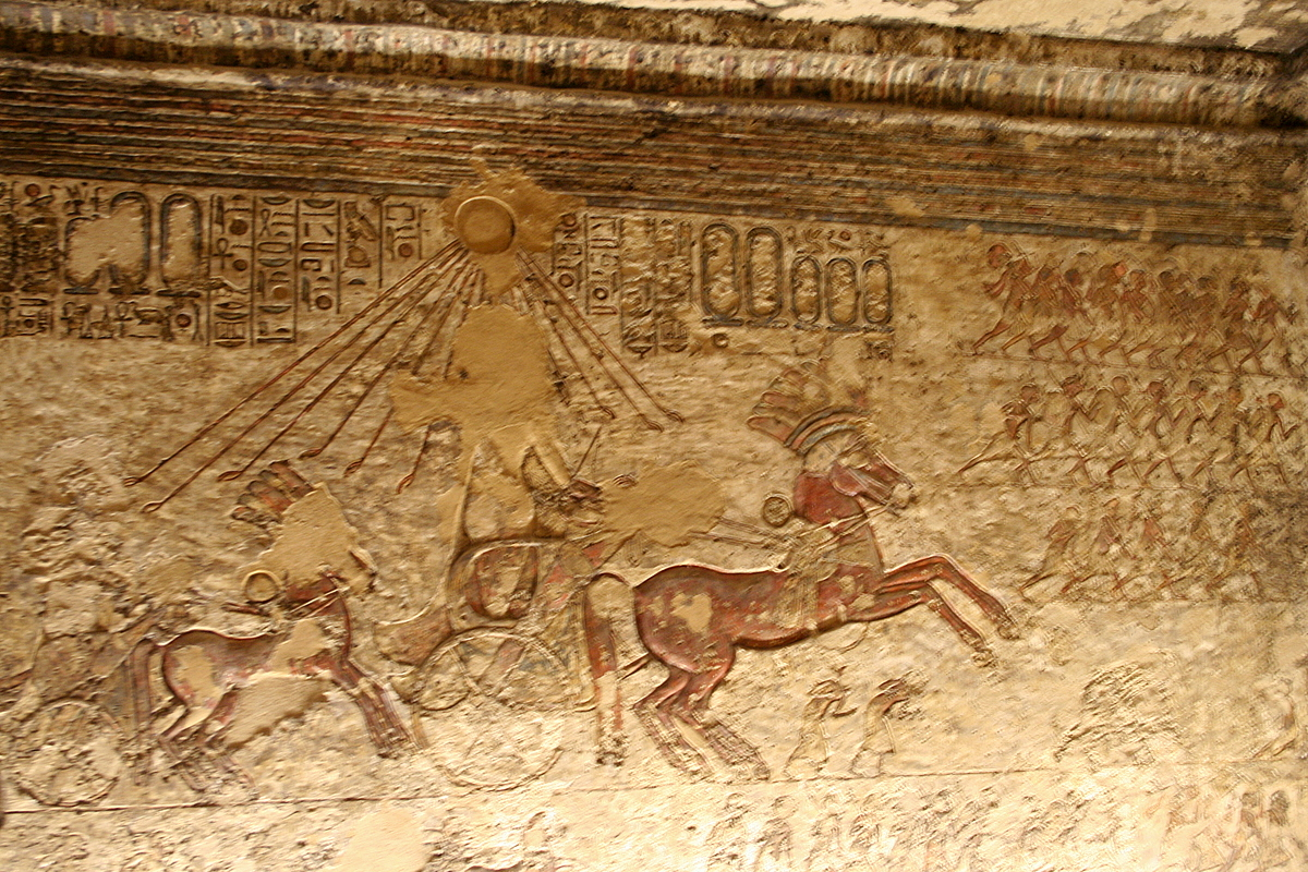 Tombes d'El-Amarna - Représentation dégradée du roi sur son char